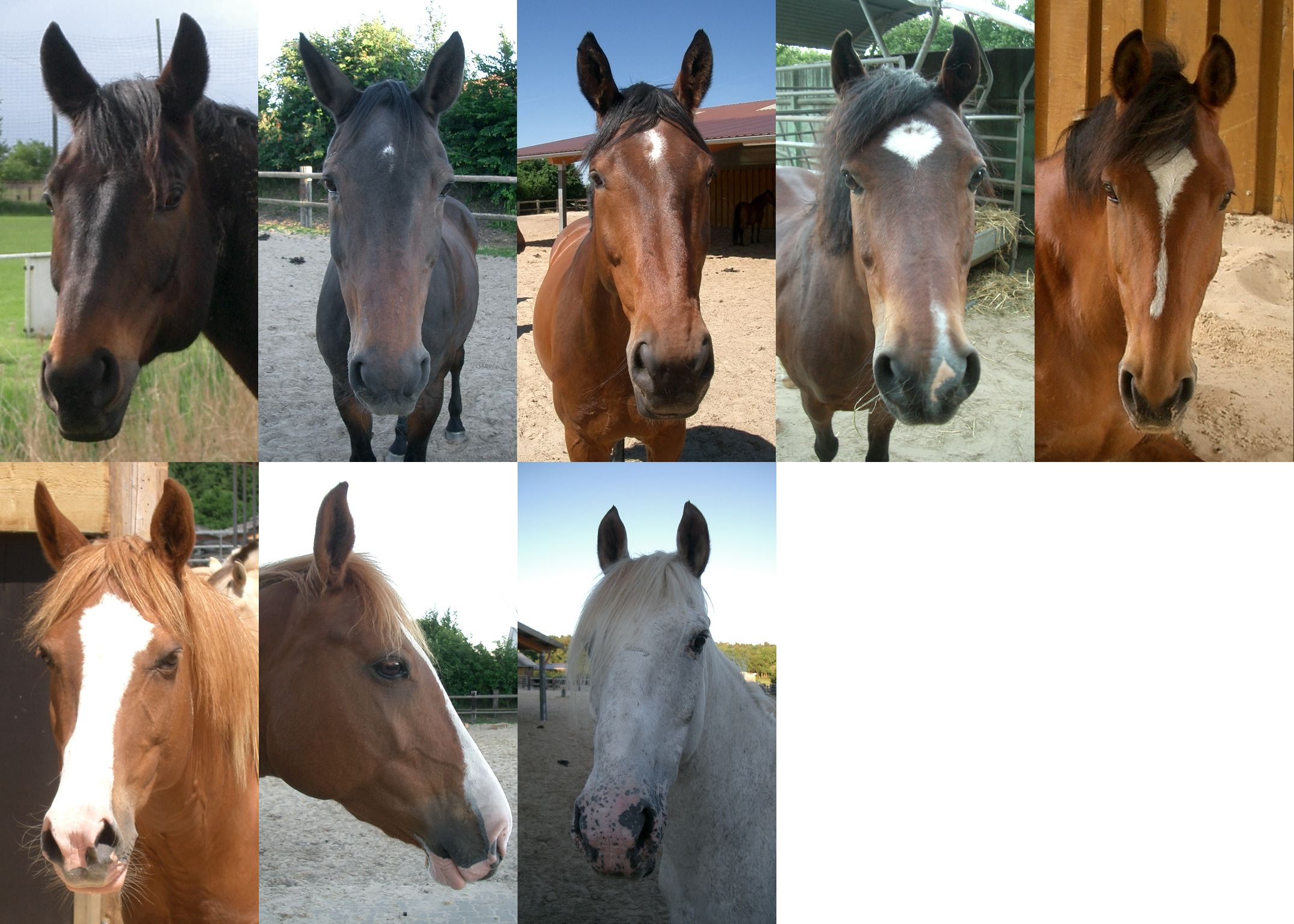 Verschiedene Abzeichen bei Pferden. V.l.n.r.: Ohne Blesse (nur mit einzelnem Wirbel), Flocke, Flämmchen, Stern mit Schnippe, unregelmäßige Schmale Blesse, Breite Blesse, Milchmaul, Krötenmaul